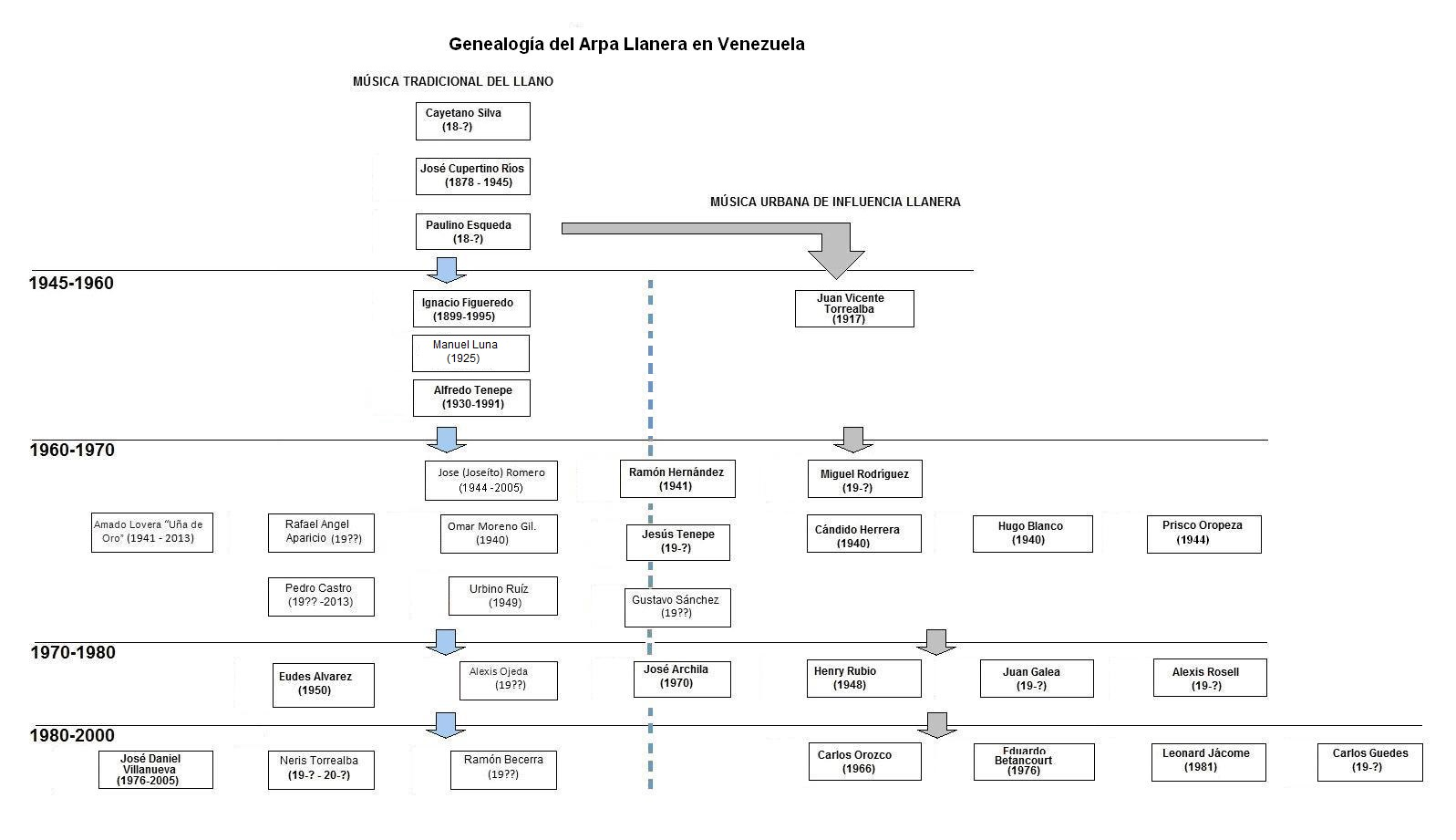 El gráfico ilustra la línea genealógica de ejecutantes del arpa llanera en Venezuela desde finales del siglo XIX hasta la actualidad.